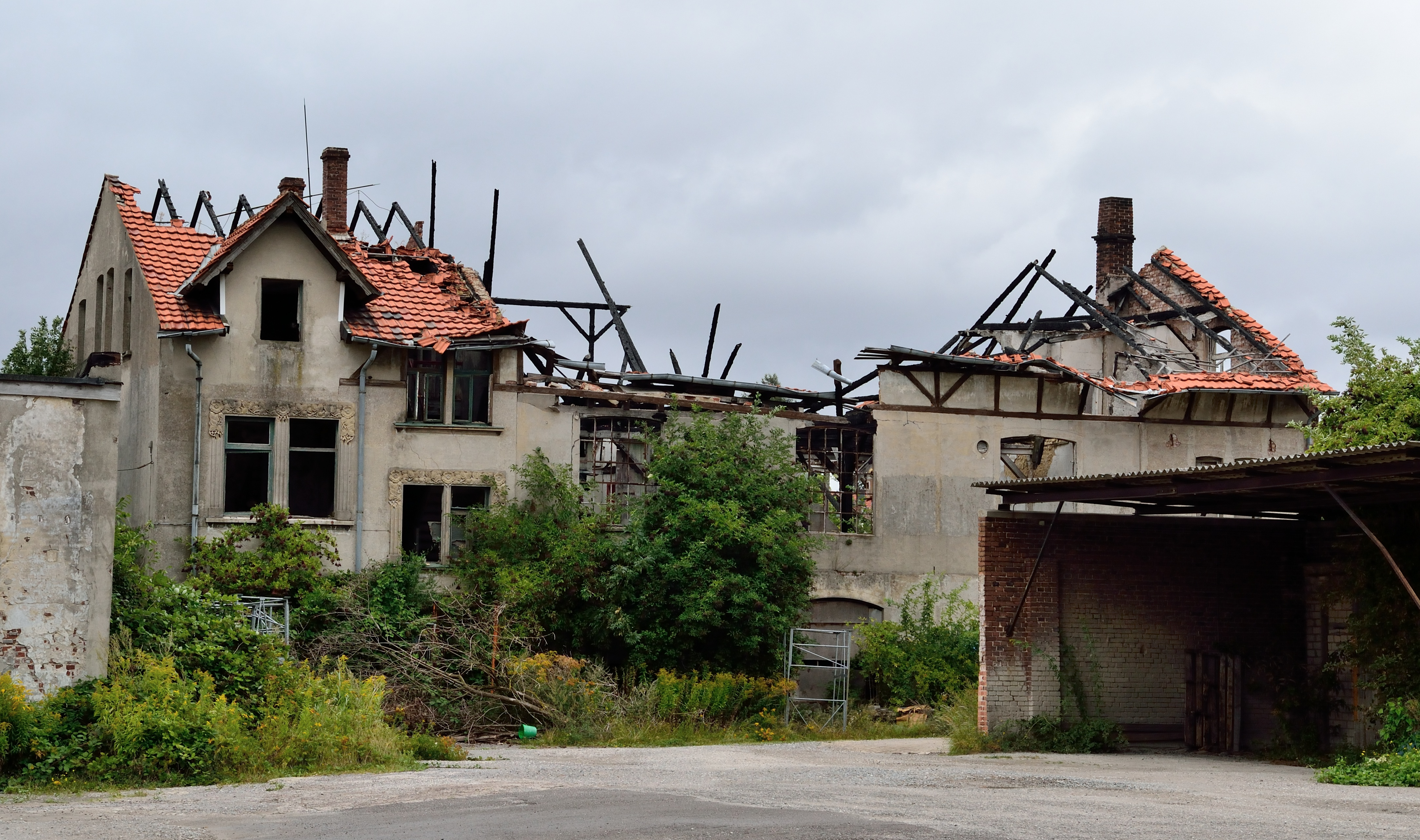 Ehemalige Stuckfabrik Gebr. Strobel in Detmold